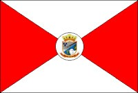 Bandeira de Abadia de Goiás, Brasil